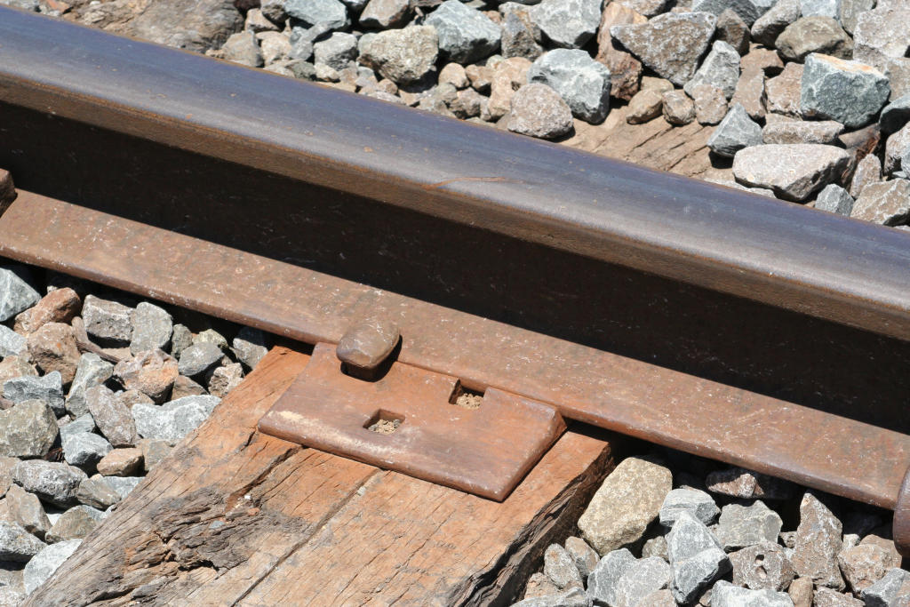 Dogspike holding rail to wooden sleeper, steel baseplate in between